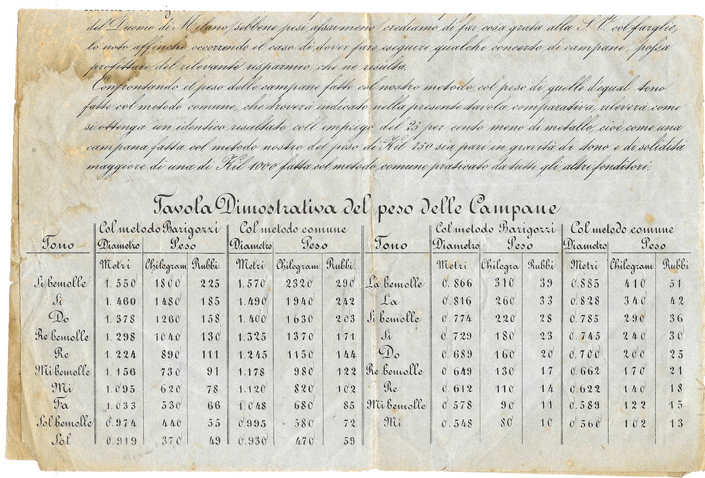 Documento pubblicitario che illustra il "metodo Barigozzi".